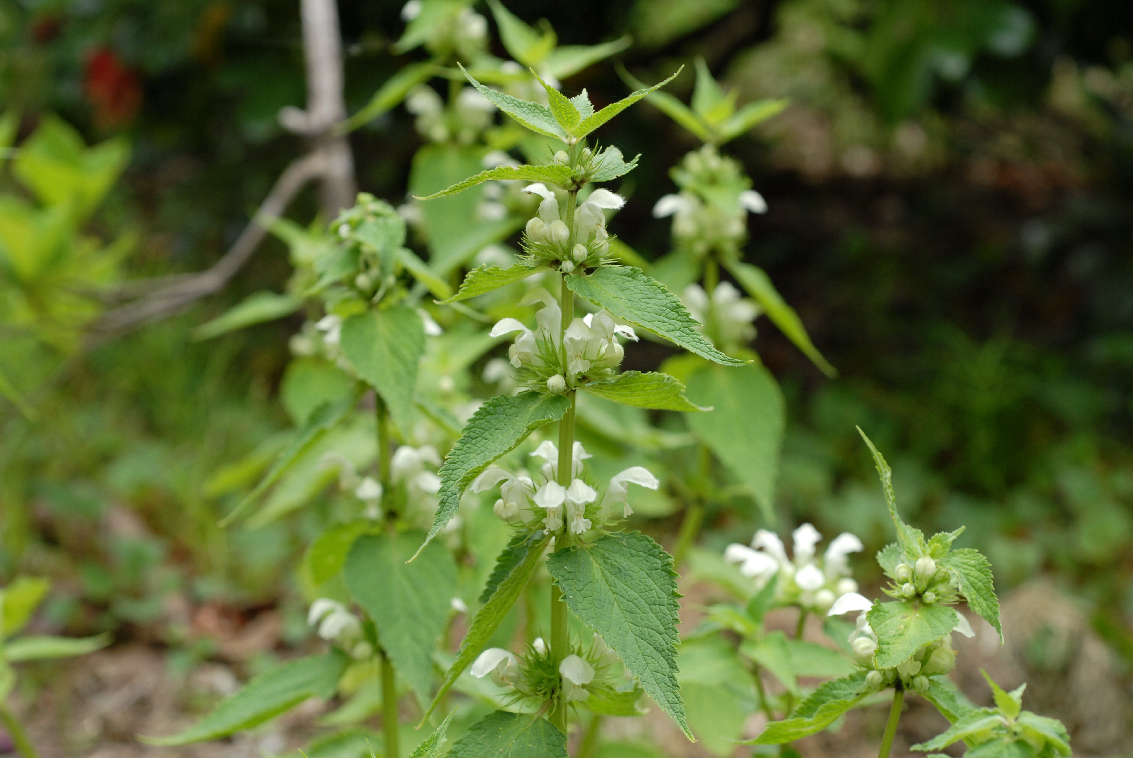 オドリコソウの白花 Lamium album L. var. barbatum (Siebold et Zucc.) Franch. et Sav.